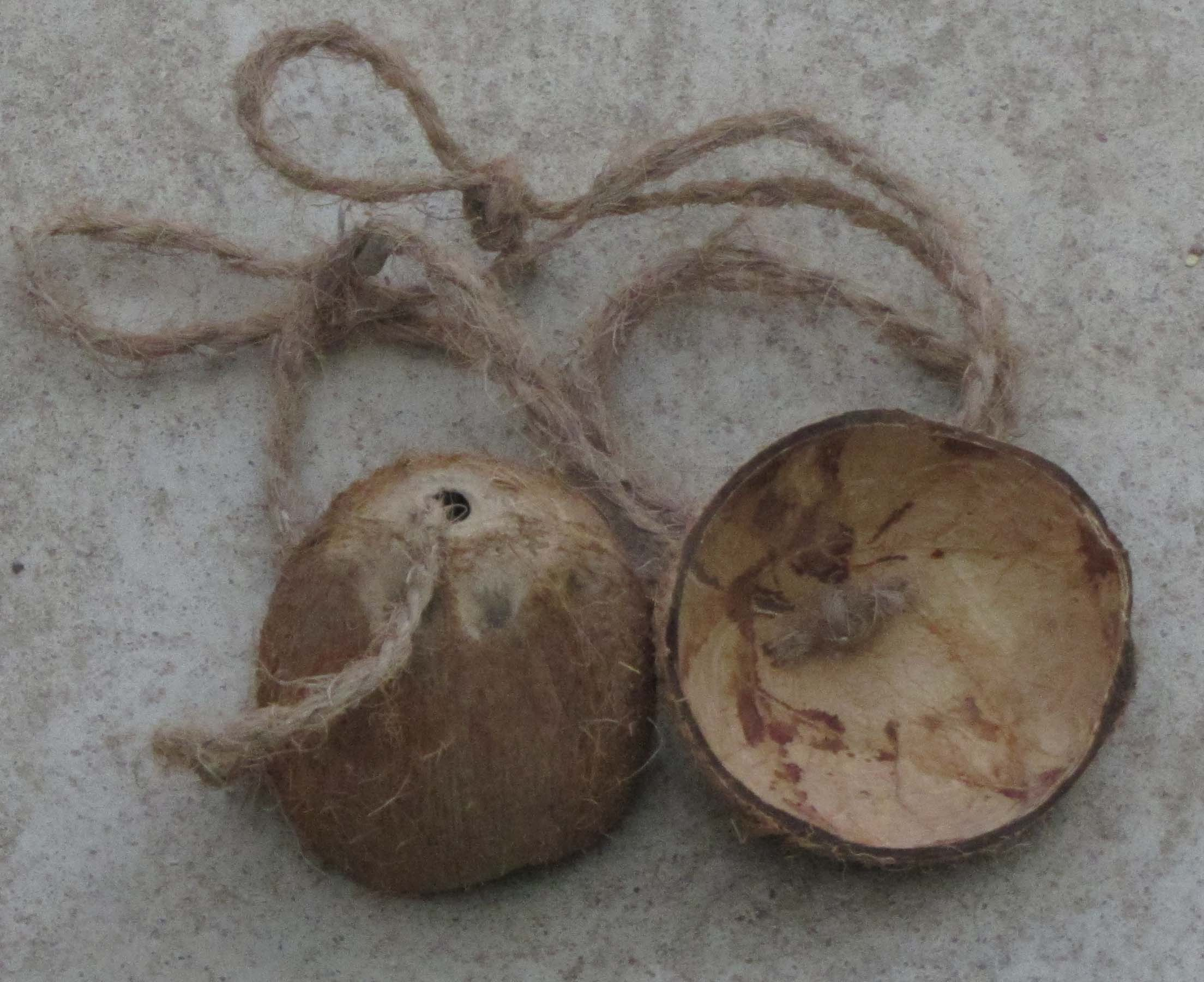 பொய்க்கால் நடை விளையாட்டுக்கு உதவும் கொட்டாங்குச்சிகள். எனது படம்